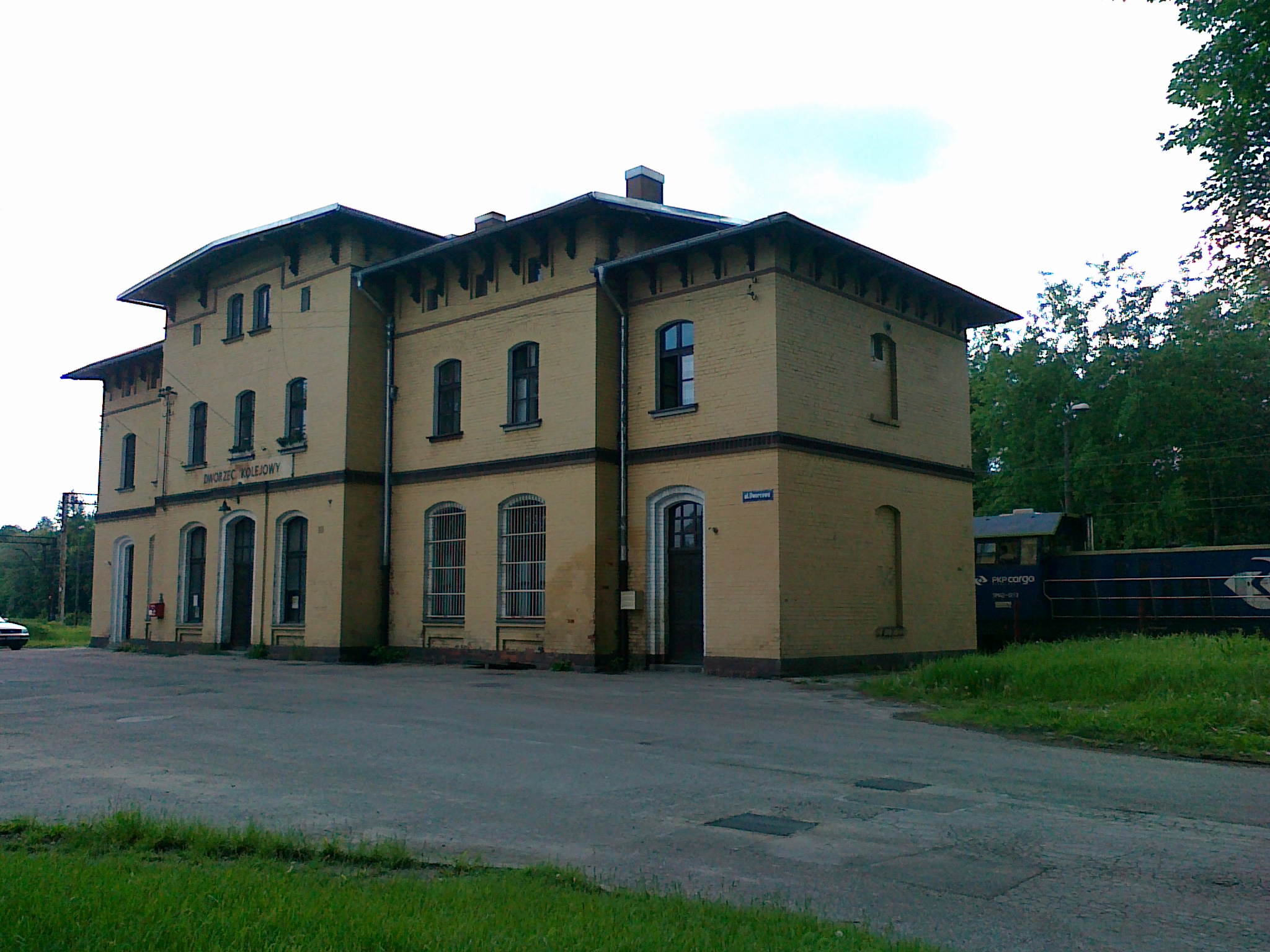 Miasteczko Śląskie - dworzec